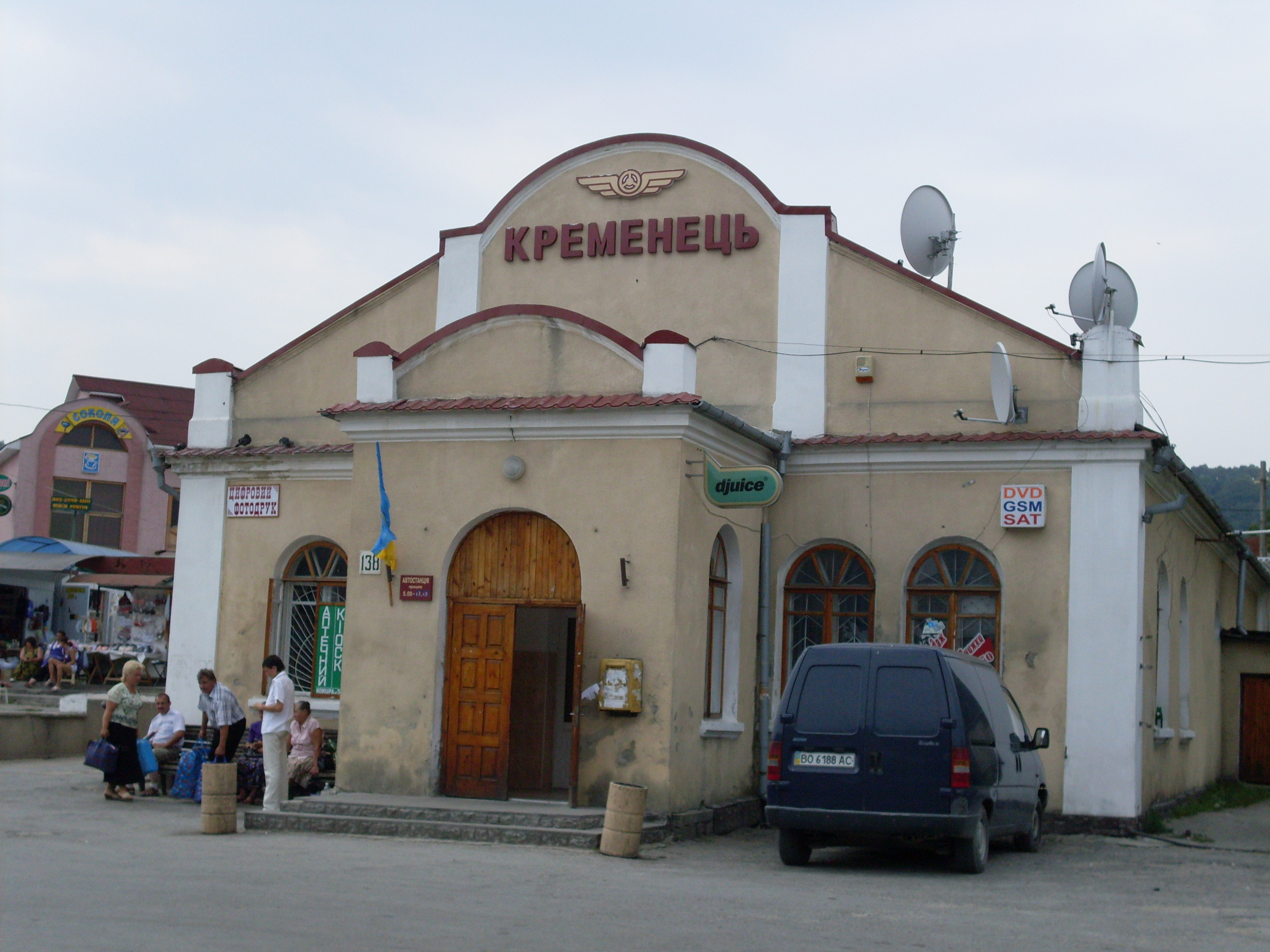 Синагога, Кременець, Тернопільська область